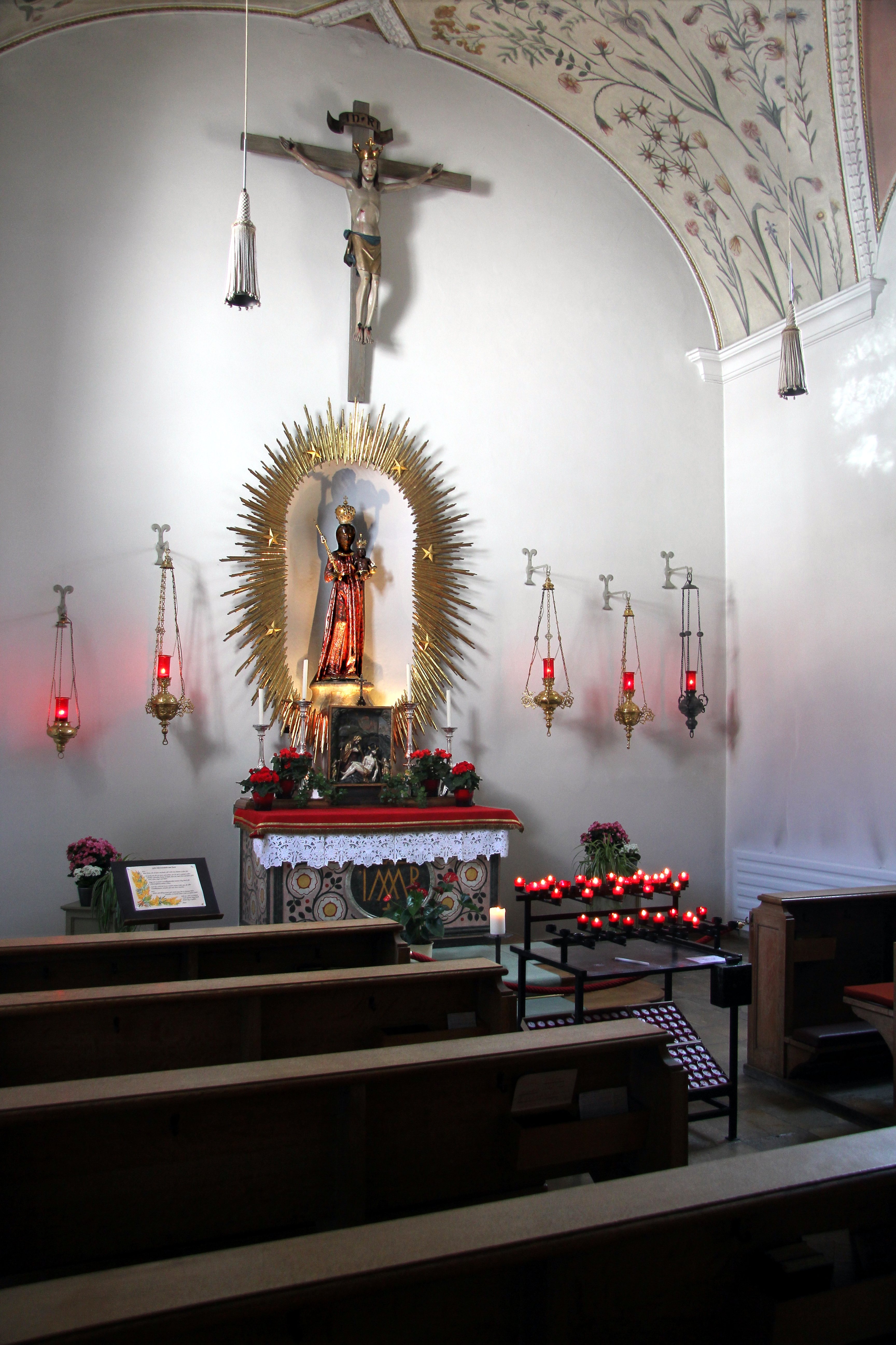 Dominikanerinnenkloster Bad Wörishofen, Marienkapelle mit Schwarzer Madonna